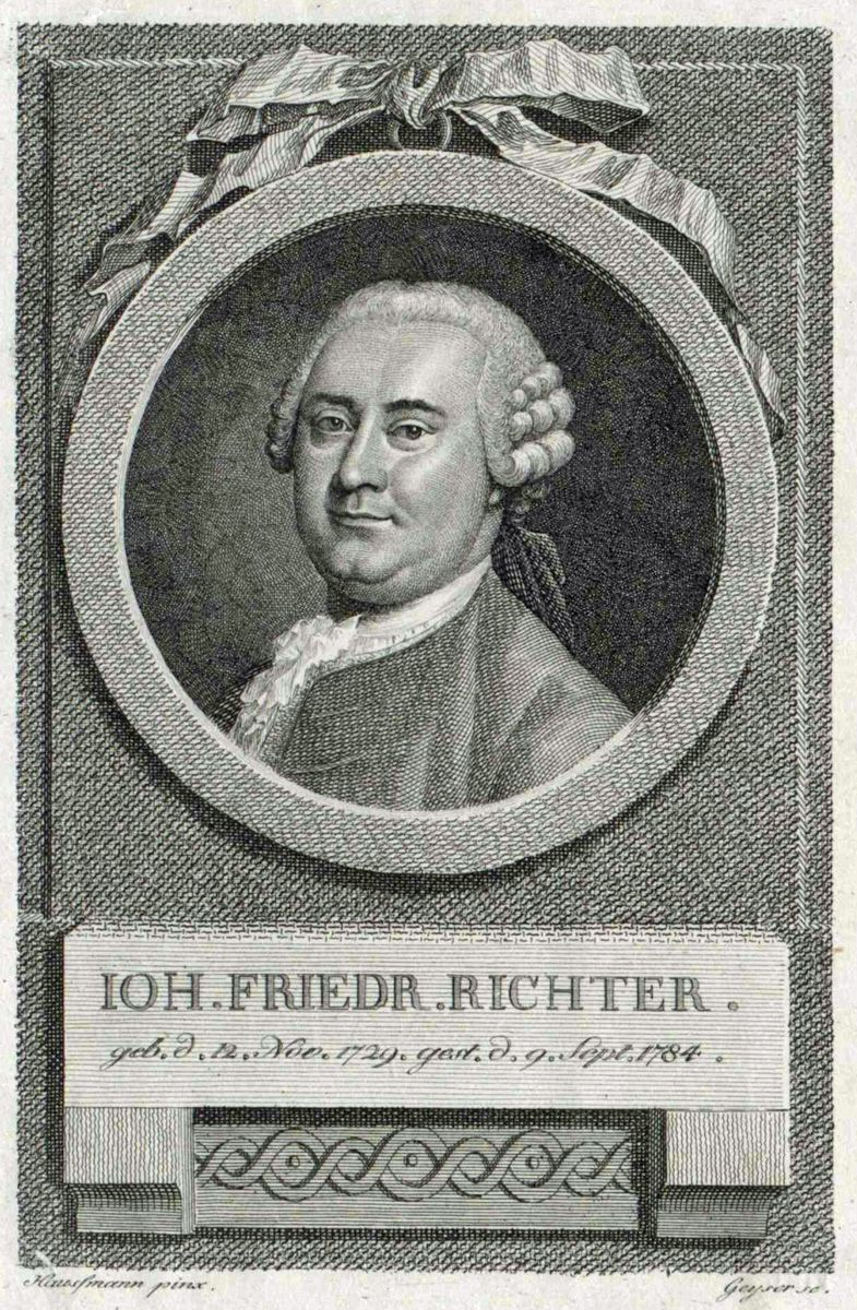 Porträt des Bankiers und Kunstsammlers Johann Friedrich Richter